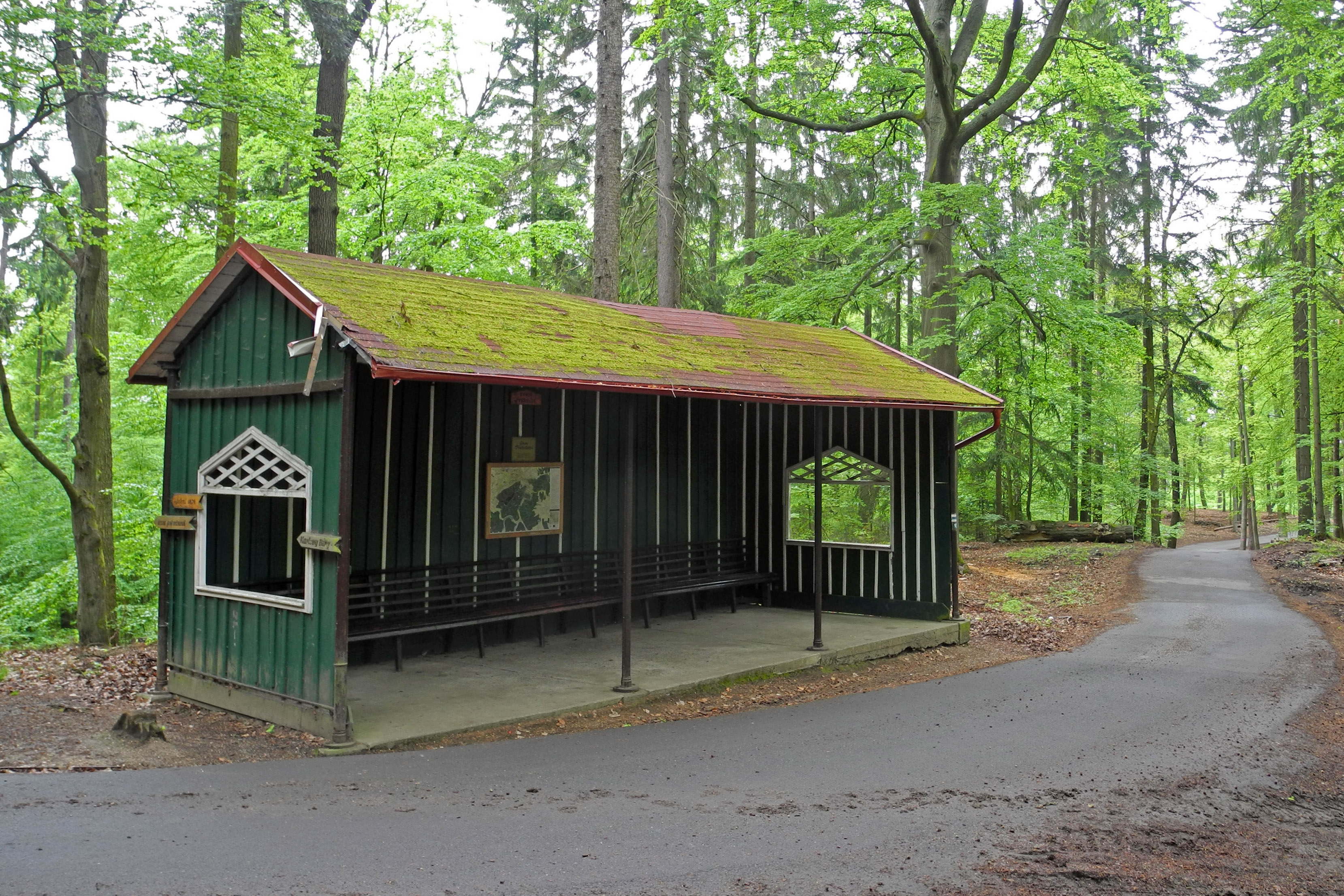 Pavillon Přátelství (Freundschaft) am Cesta Přátelství im Stadtwald von Karlsbad (Karlovy Vary)